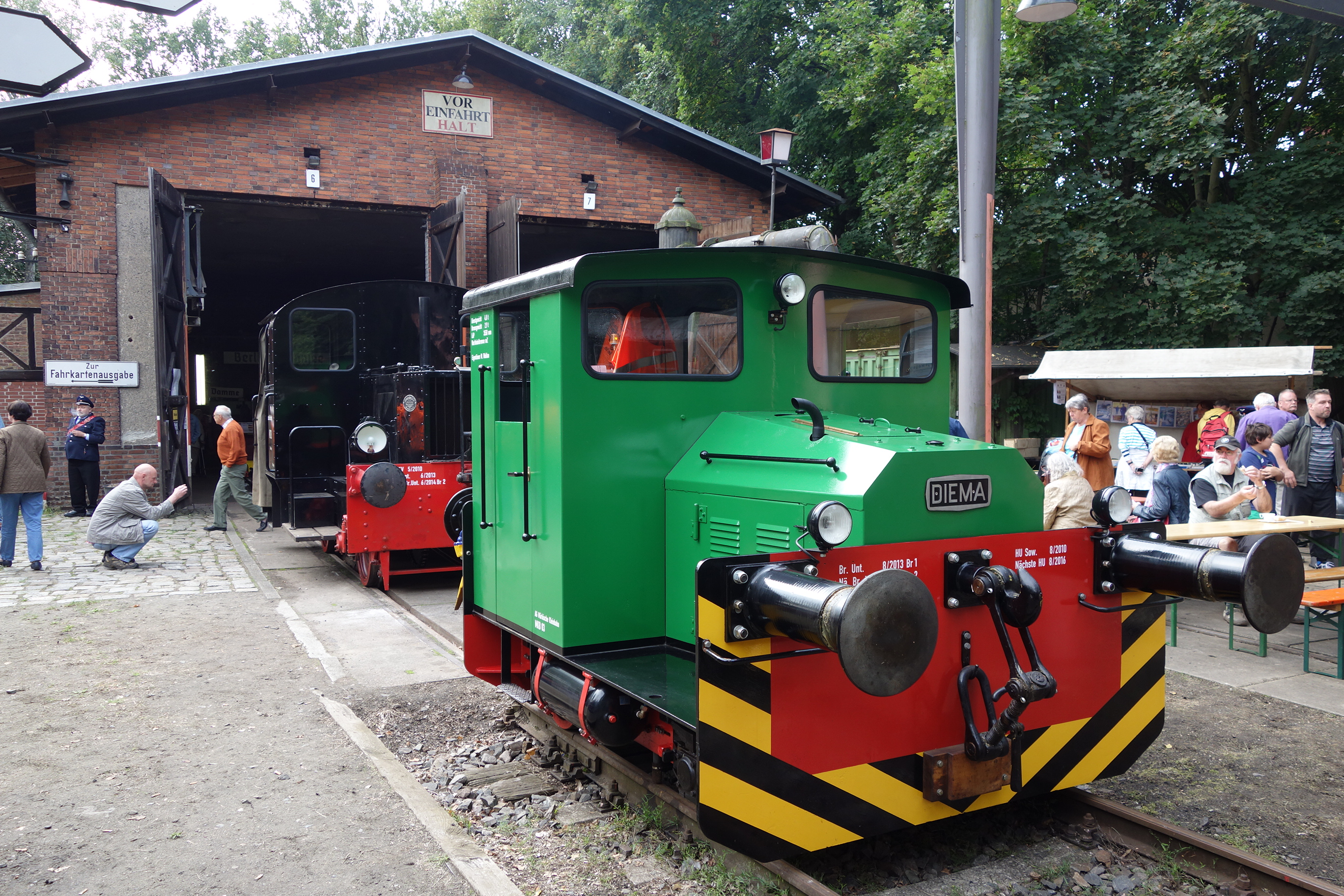 Museum der AG Märkische Kleinbahn an der Goerzallee, Fahrzeugausstellung und Lokschuppen